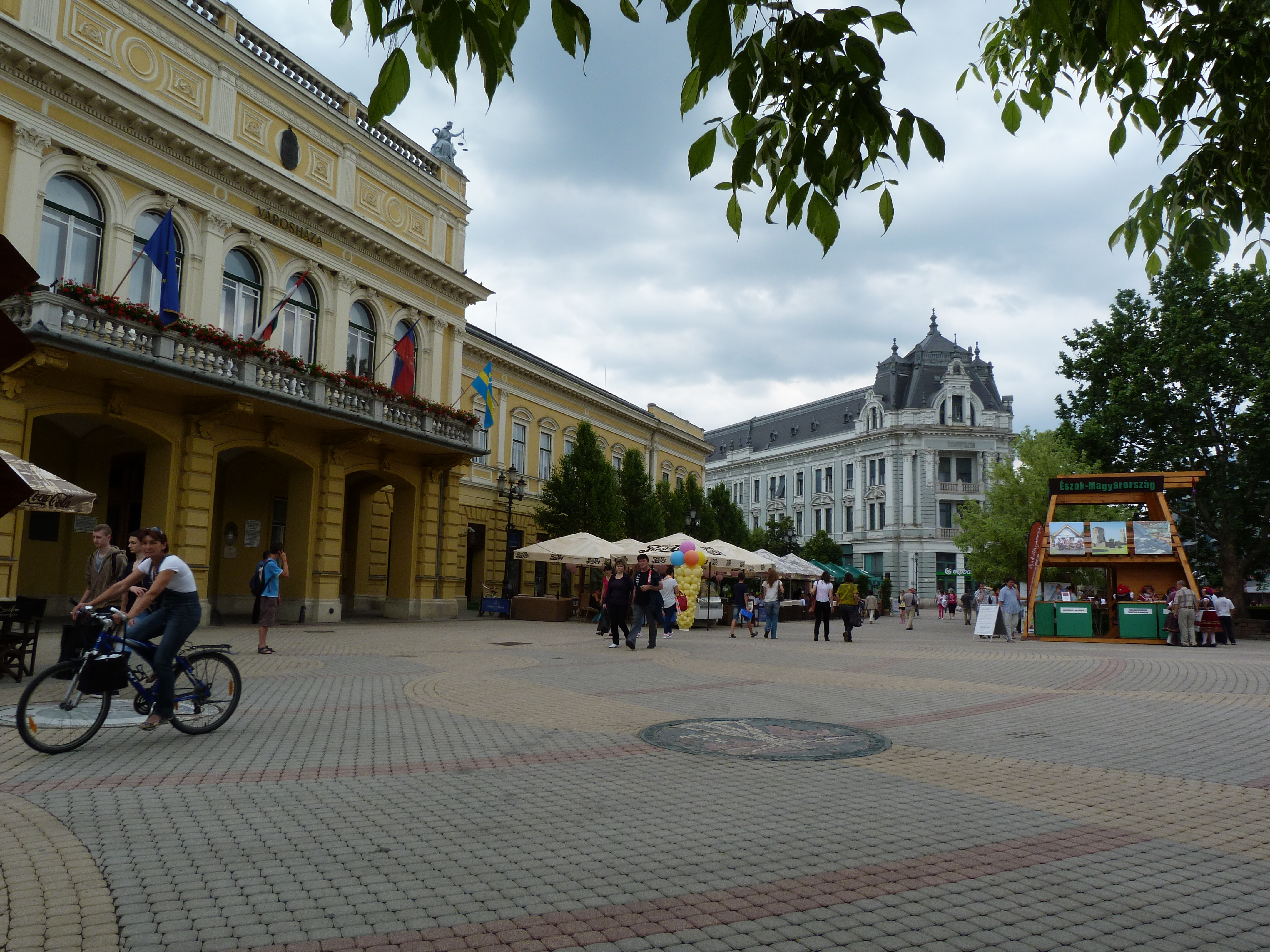 A felvétel 2013. Május 17 –én pénteken készült Nyíregyházán.